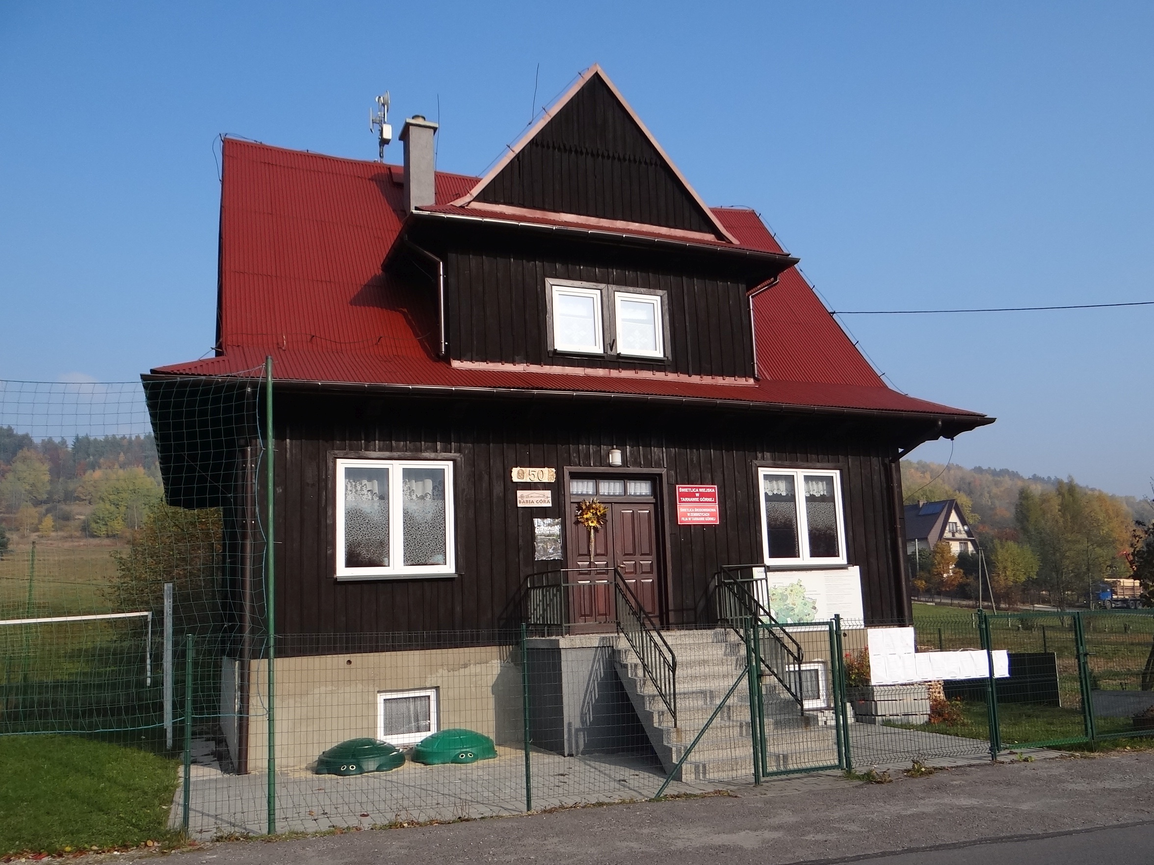 Świetlica w Tarnawie Górnej